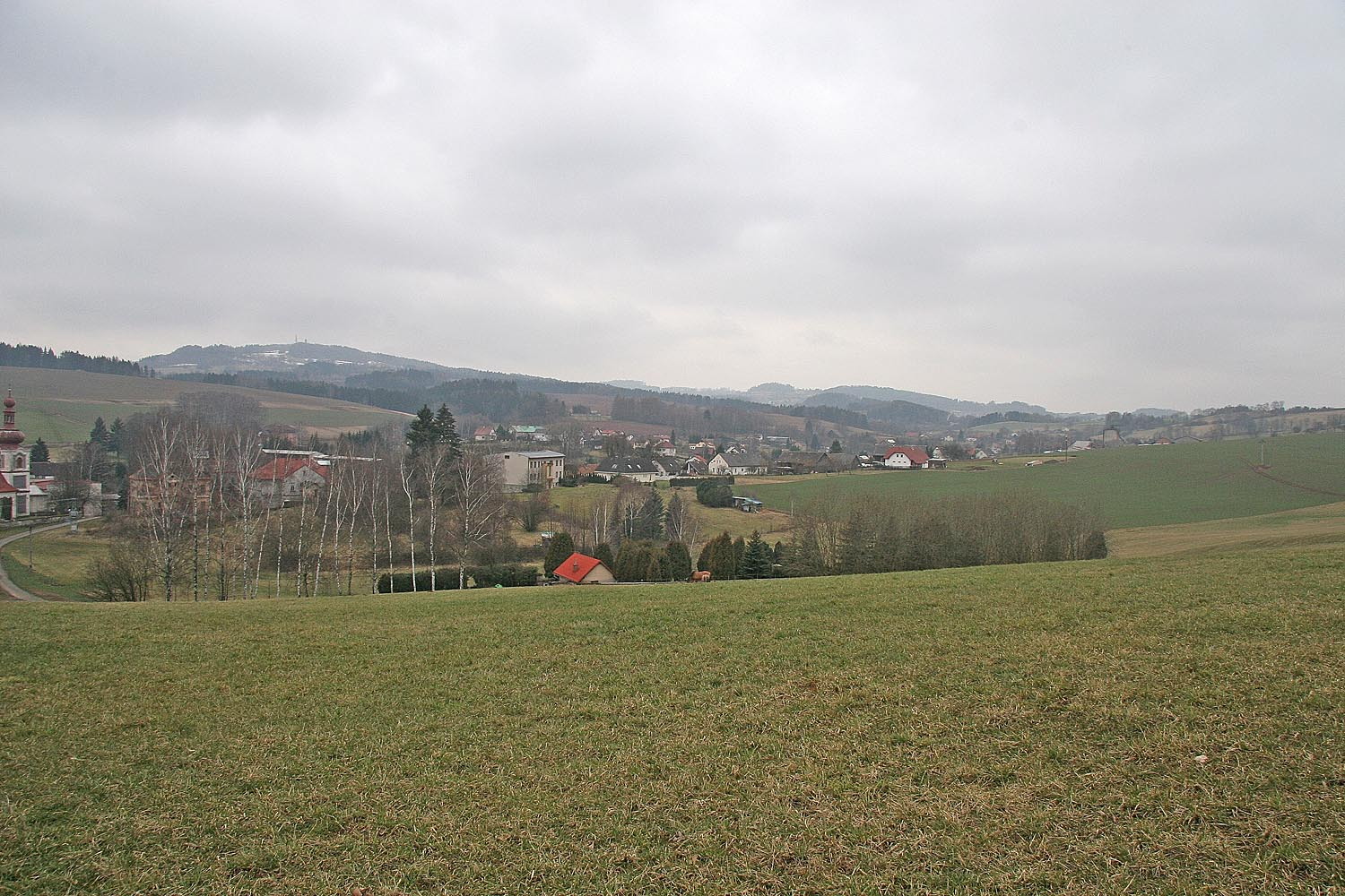 Nová Ves nad Popelkou, district Semily, Czech Republic autor:Prazak date: 23. 2. 2007